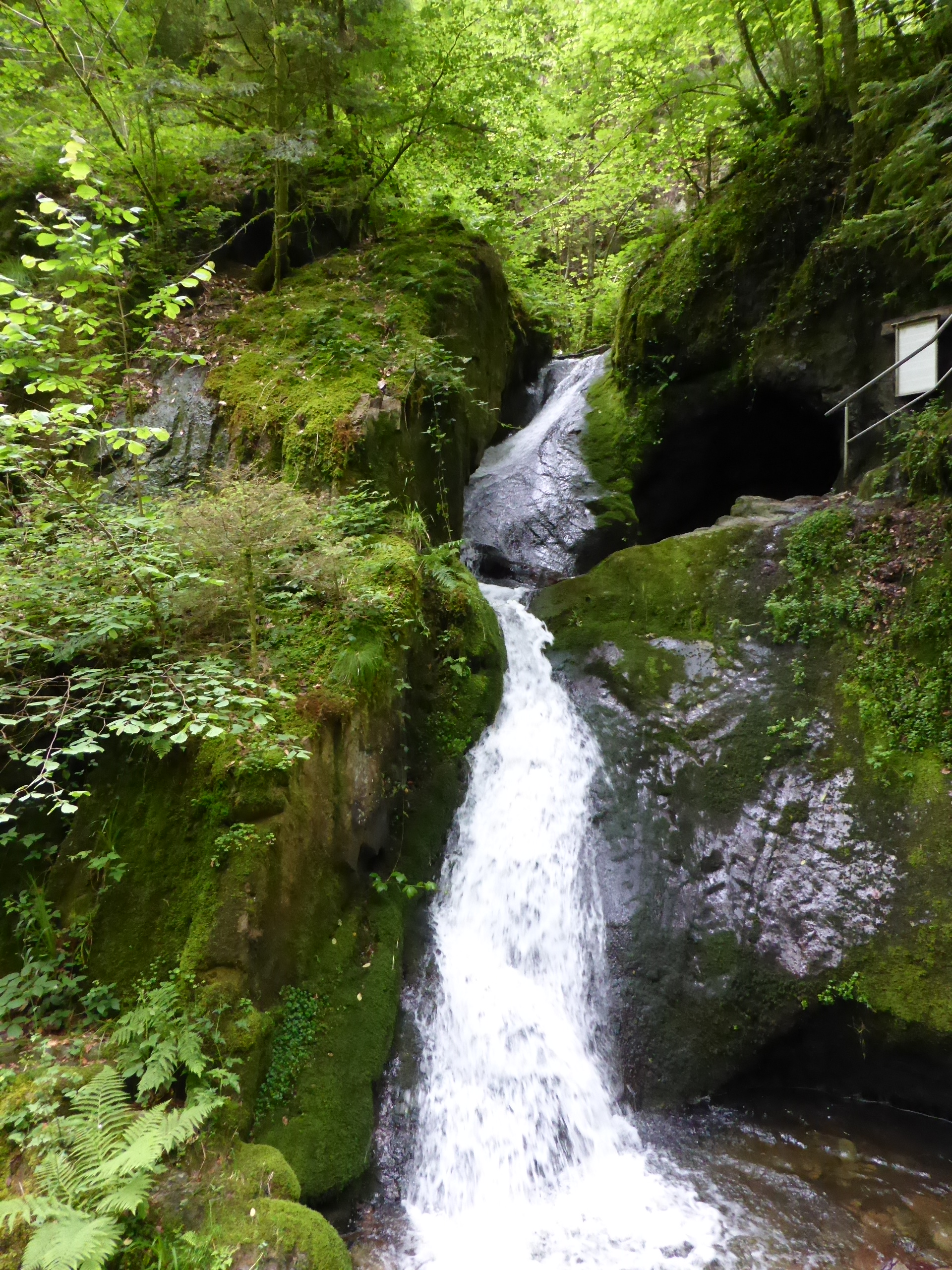 Edelfrauengrab-Wasserfälle am Genießerpfad über den Karlsruher Grat.